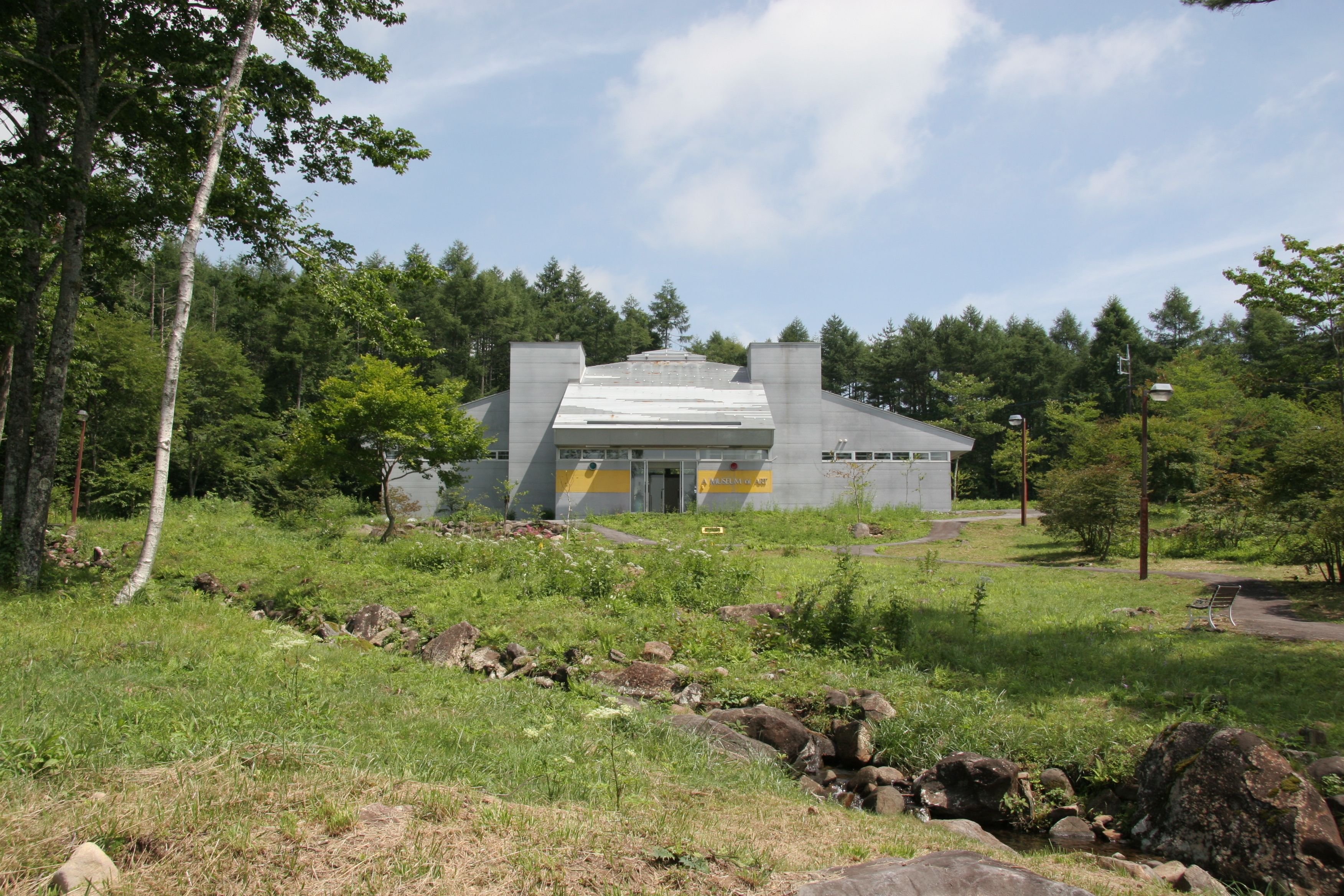 田中治彦モダンアート美術館 外観。